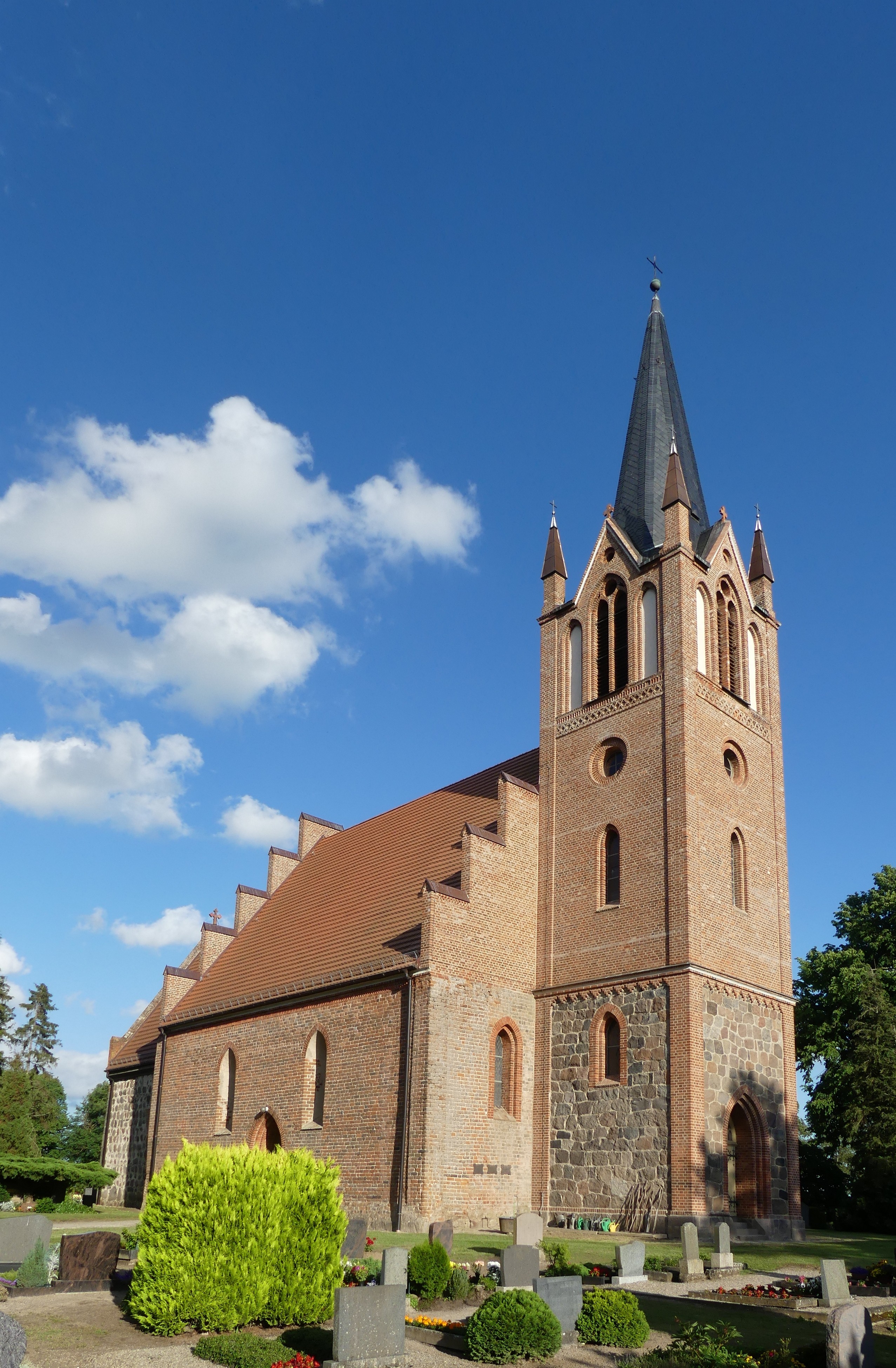 St.-Johannis-Kirche in Kartlow, Gemeinde Kruckow, Landkreis Vorpommern-Greifswald, MV